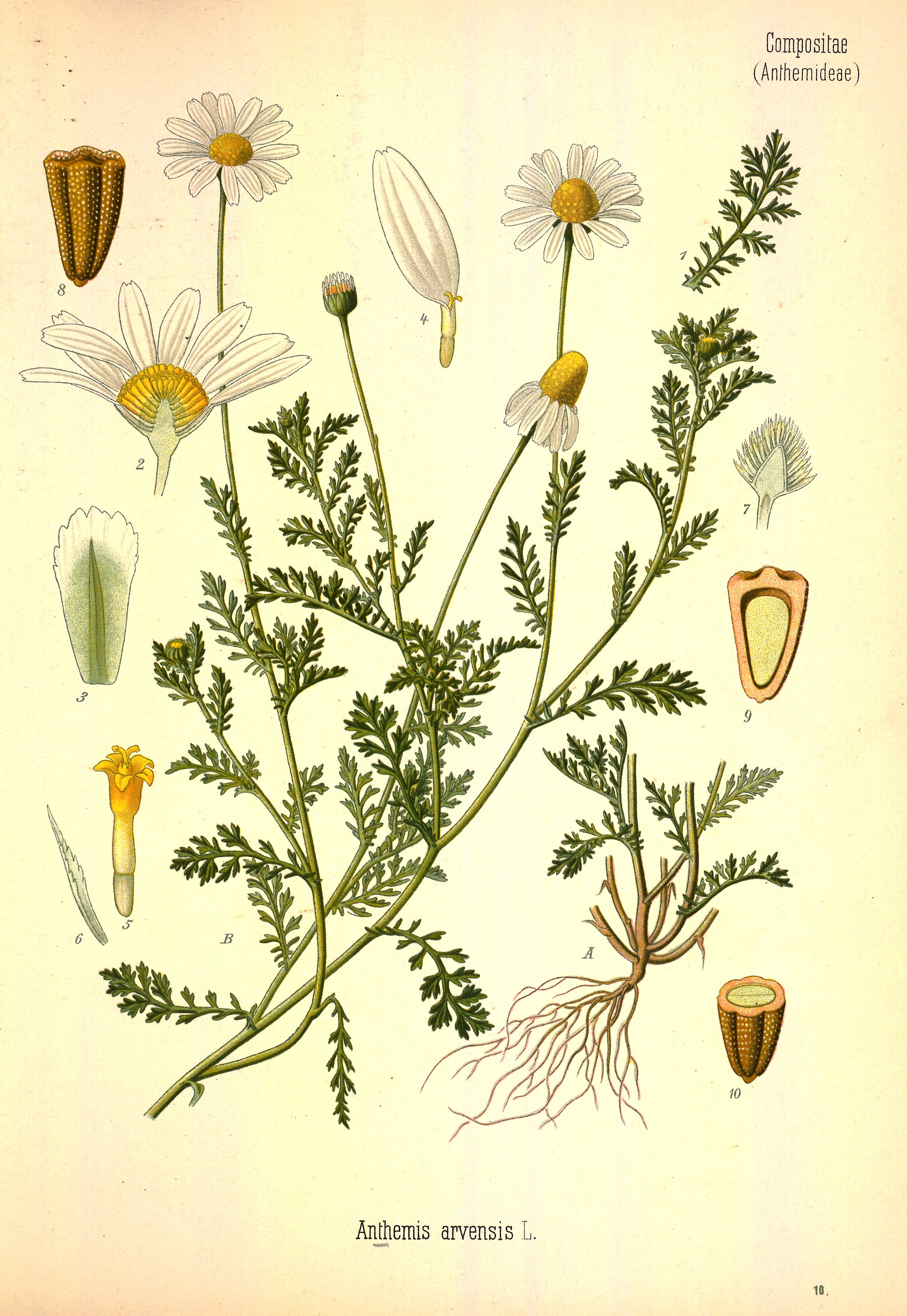 Legende: A Unterer Teil der Pflanze. B Oberer Teil der Pflanze. 1 Stängelblatt. 2 Körbchen, Längsschnitt. 3 Hüllblatt. 4 Strahlenblüte. 5 Röhrenblüte. 6 Spreublatt. 7 Körbchenboden mit Spreublättern, Längsschnitt, Blüten entfernt. 8 Frucht. 9 Frucht, Längsschnitt. 10 Frucht, Querschnitt. (A, B, 1, 7 x1, 1-6, 8-10 vergr.).